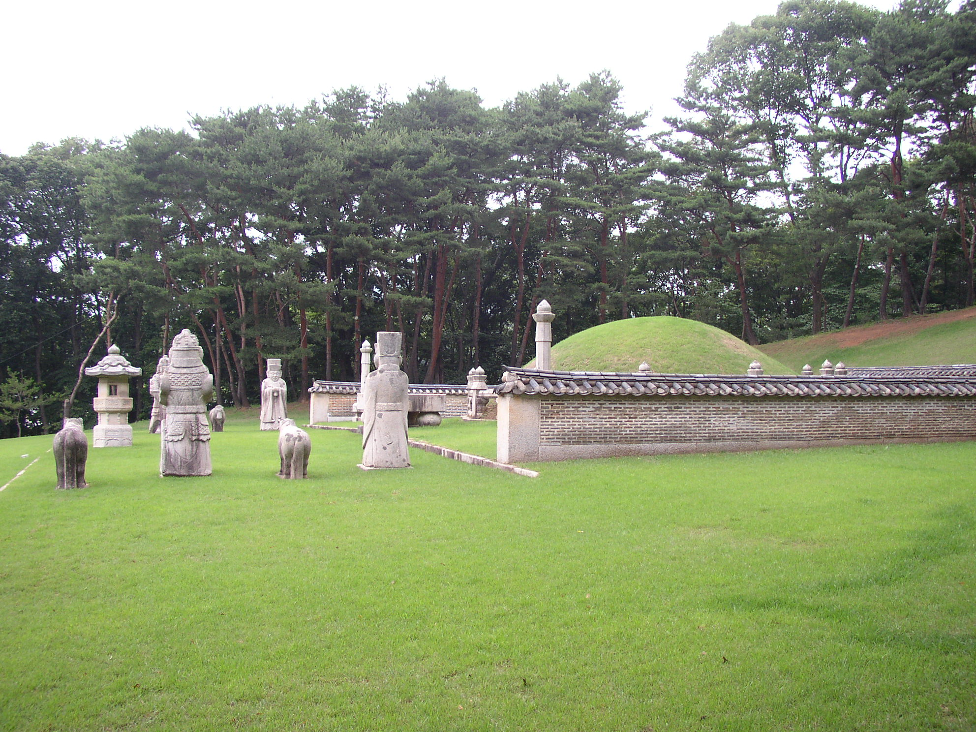 조선 순조의 무덤인 인릉(仁陵)